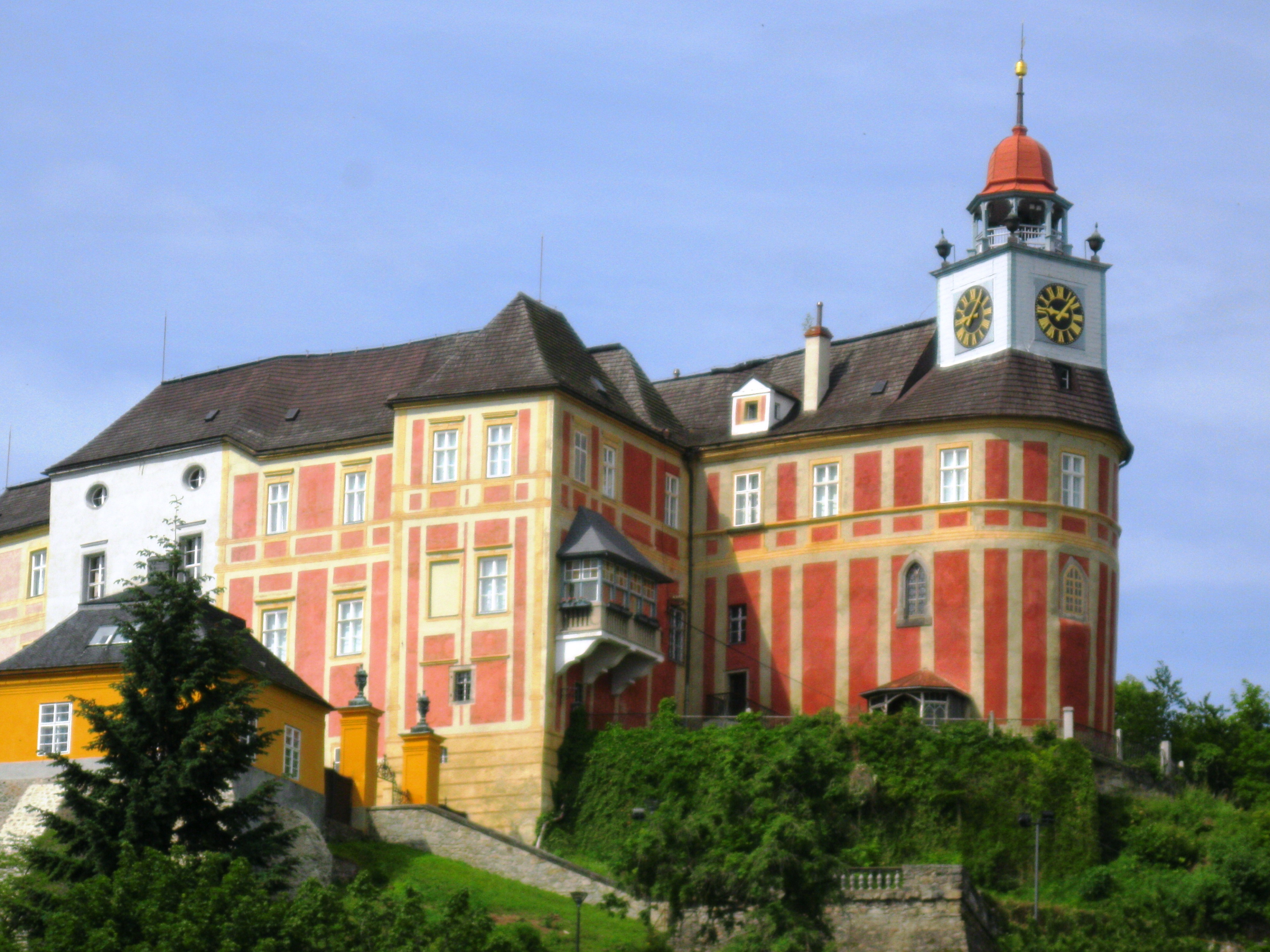 Zámek Jánský vrch Město Javorník